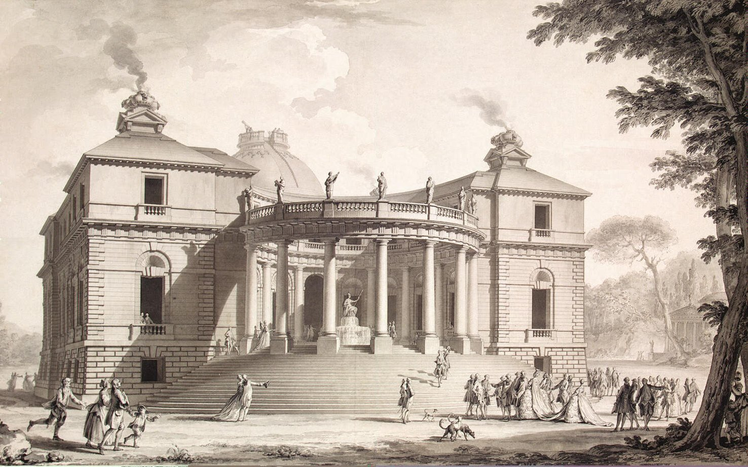 Werk von Charles De Wailly